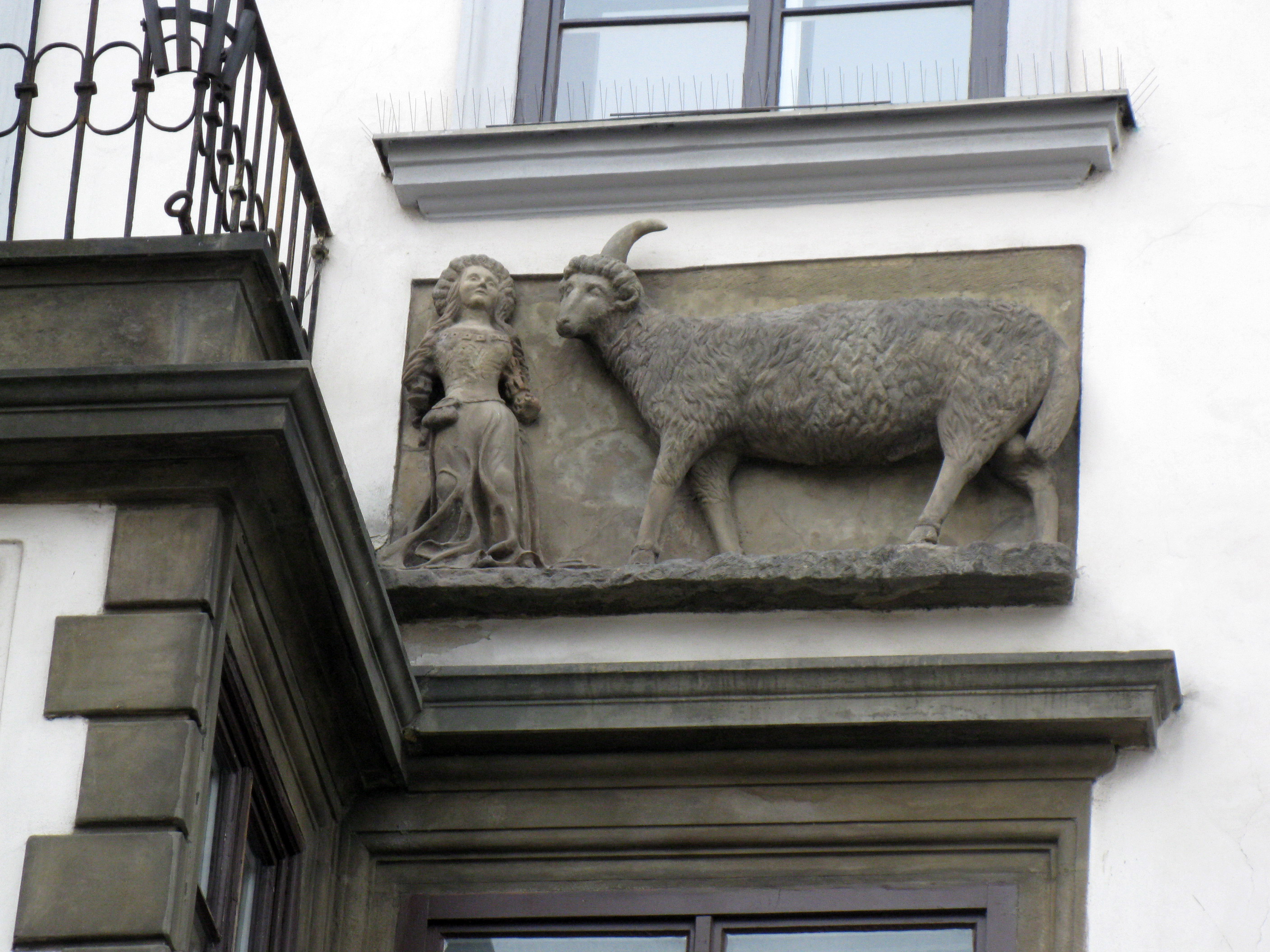 Městský dům U Kamenného beránka (Staré Město), Praha 1, Staroměstské nám. 551/17, Staré Město